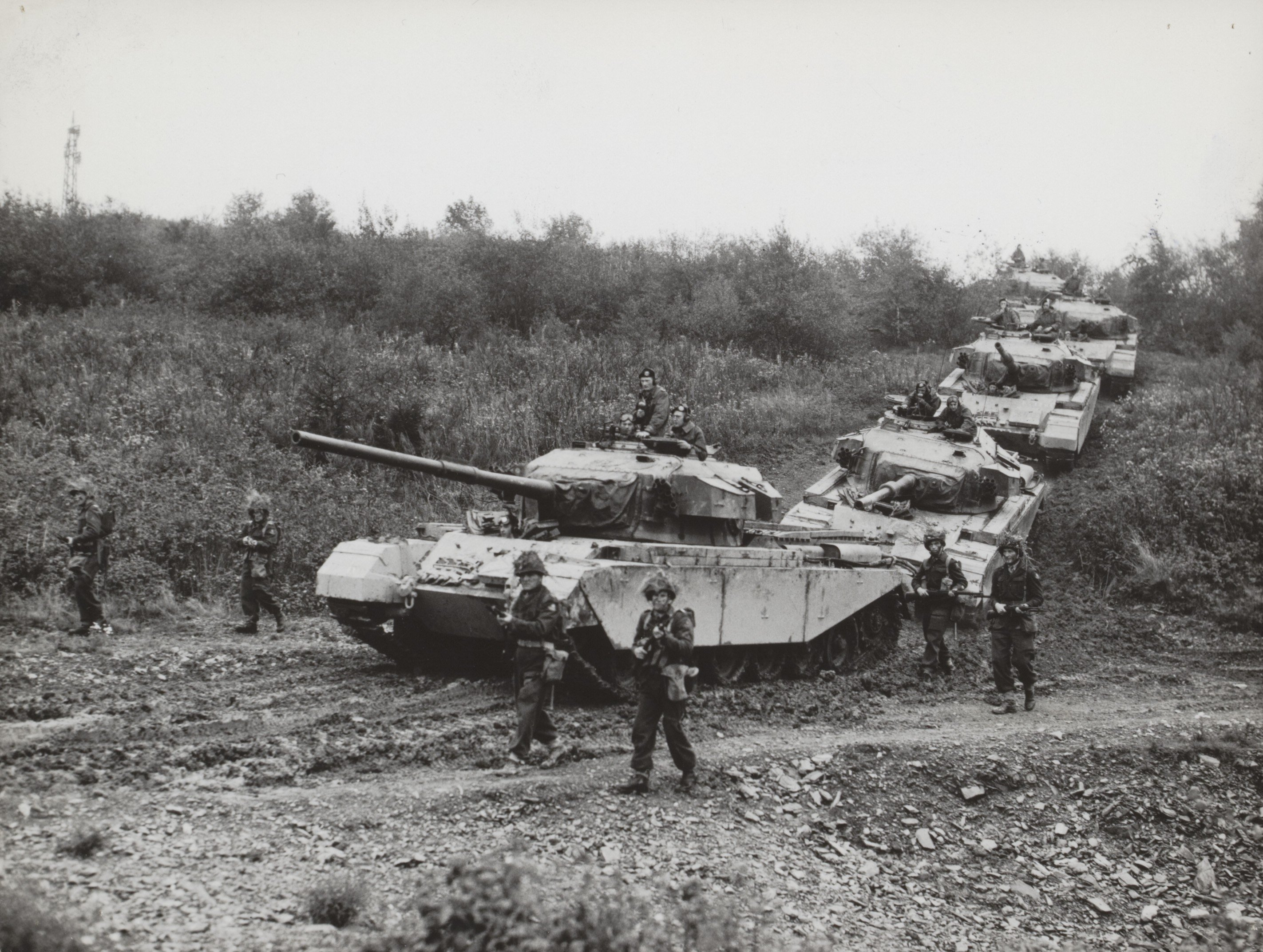 Collectie / Archief : Fotocollectie Elsevier Reportage / Serie : [ onbekend ] Beschrijving : Vogelsang (West-Duitsland). Legeroefeningen 32e regiment. Centuriontanks en infanterie Datum : 10 oktober 1956 Locatie : Duitsland, Vogelsang Trefwoorden : infanterie, leger, militairen, oefeningen, tanks Persoonsnaam : Centurion Fotograaf : Bilsen, Joop van / Anefo Auteursrechthebbende : Nationaal Archief Materiaalsoort : Foto (zwart/wit) Nummer archiefinventaris : bekijk toegang 2.24.05.02 Bestanddeelnummer : 050-0522